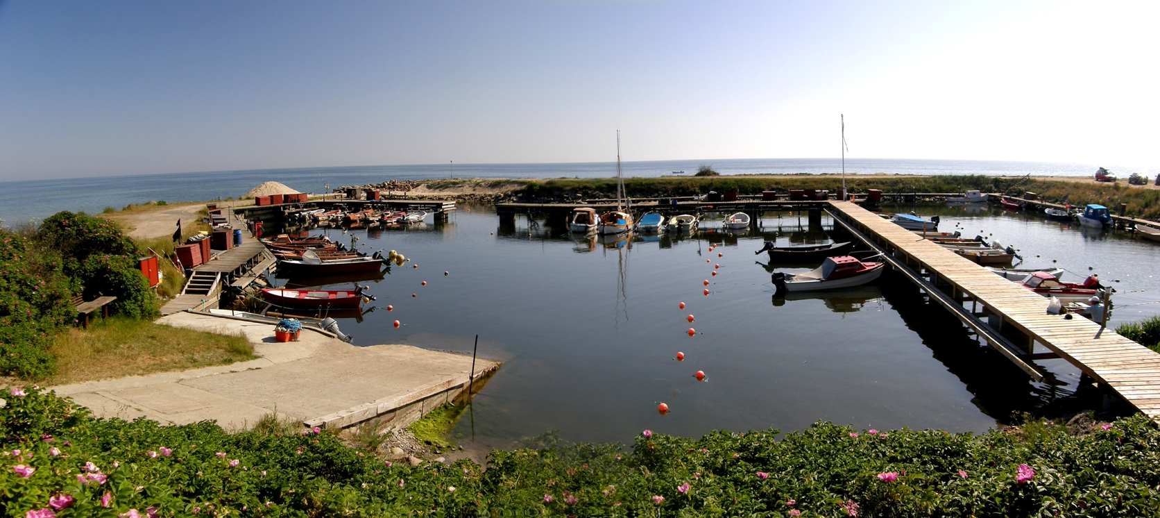 port